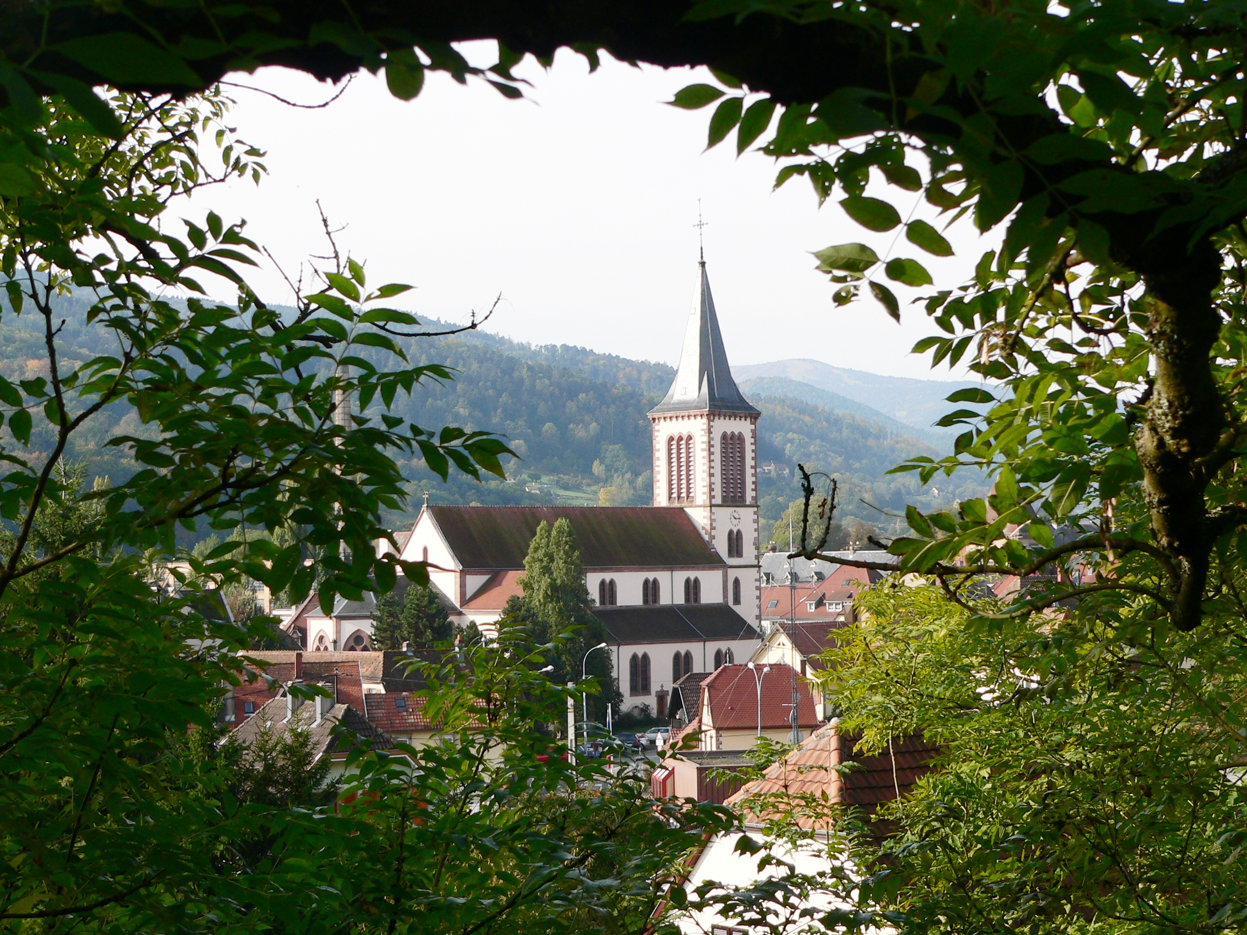 Eglise catholique St Léger